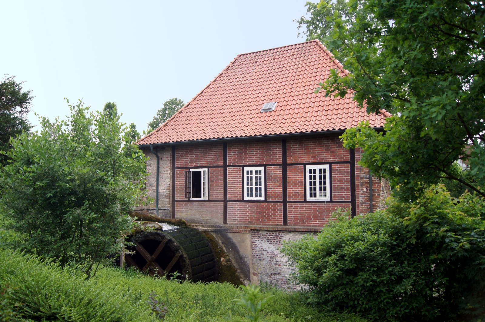 Die Bischofsmühle in Coesfeld mit dem 1986 erneuerten oberschlächtigen Wasserrad.